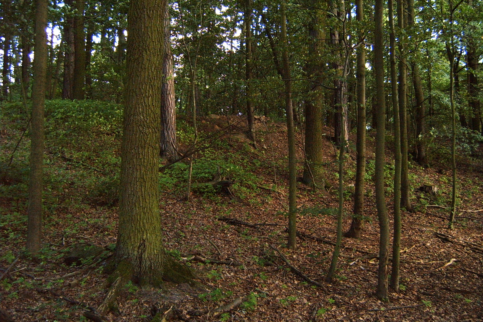 Fuglhaus - val, Klec (okres Jindřichův Hradec).